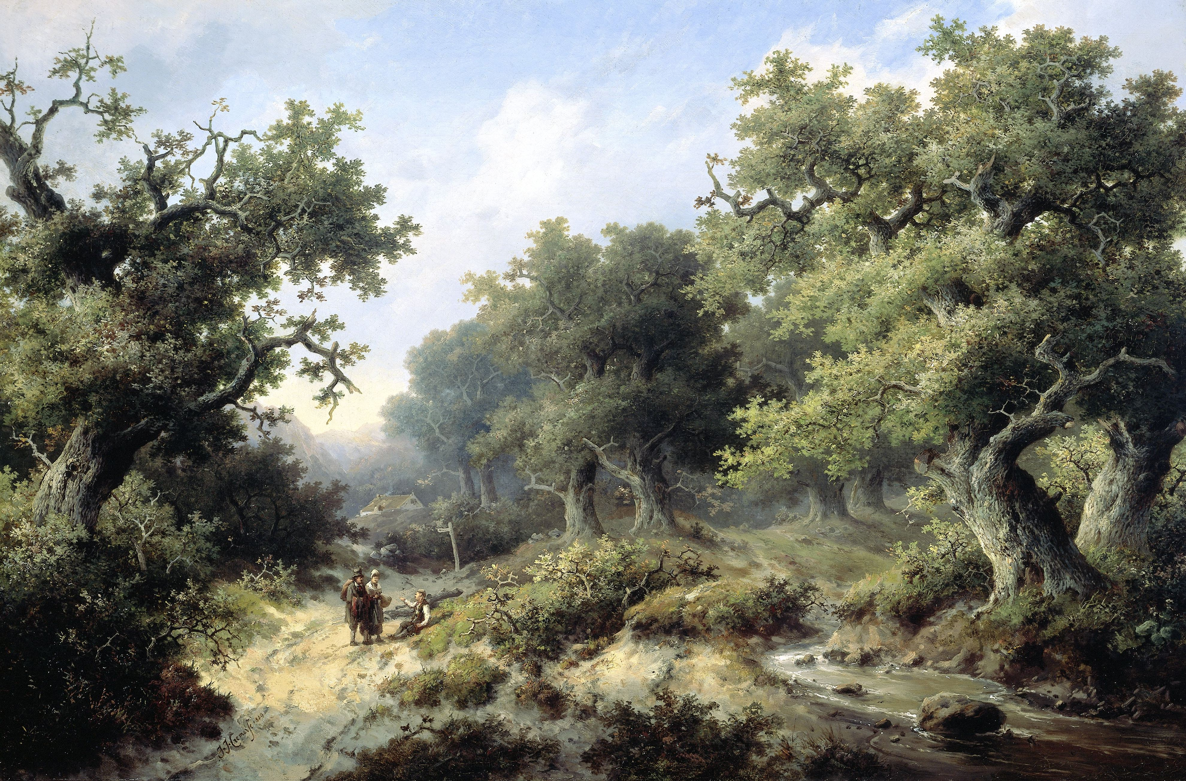 In een bosrijk zomers landschap zijn twee staande reizigers in gesprek met een langs het pad zittende man. Rechts een beek.